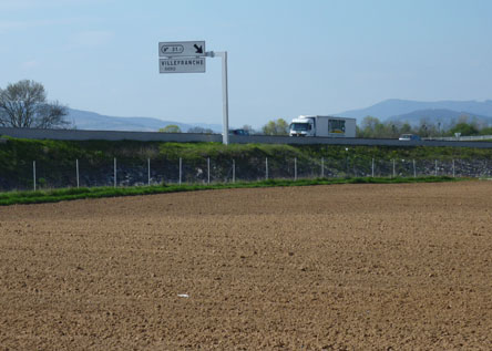 Sortie 31.22 à Arnas.